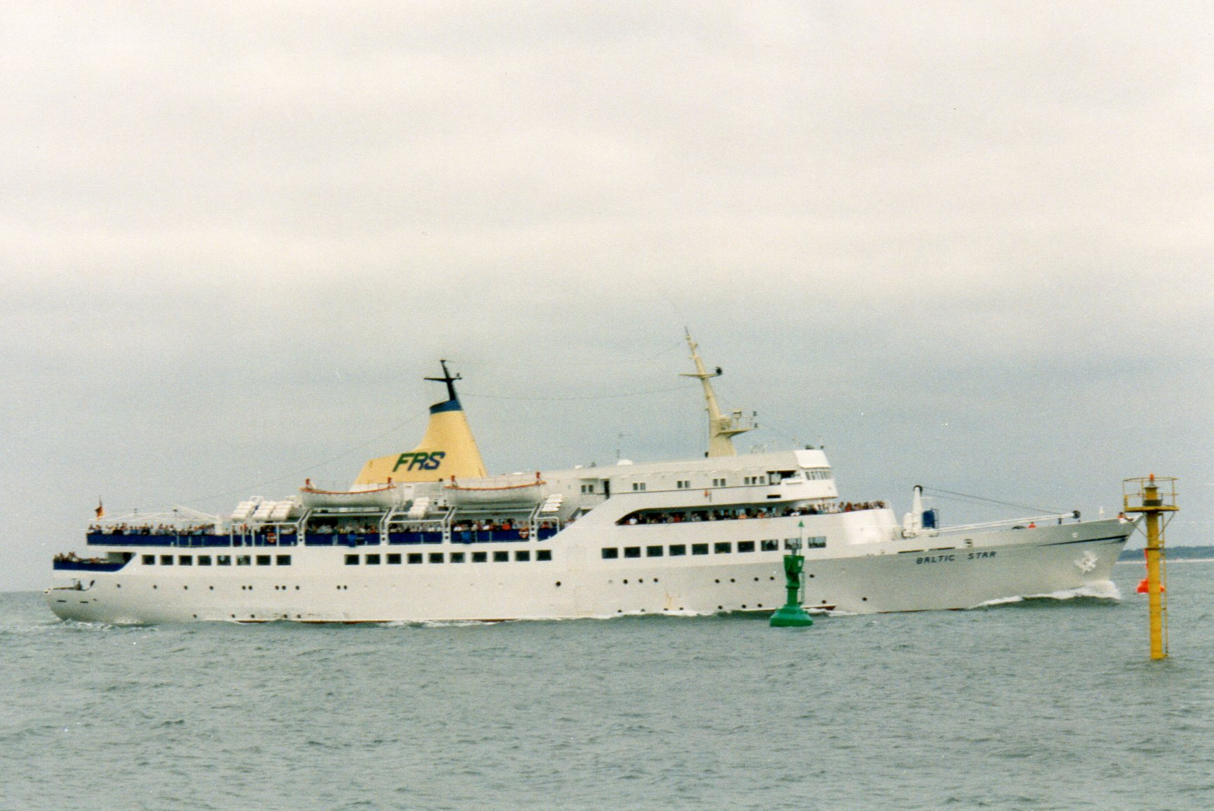 MS Baltic Star 1996 bei der Ankunft in Warnemünde von Travemünde kommend